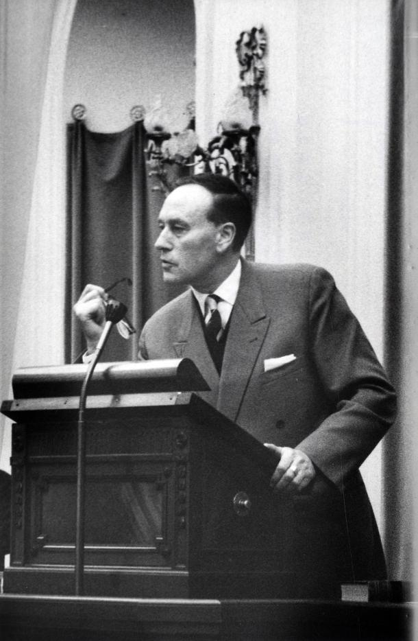 Bommer, J. (PvdA). Behandeling van de begroting van Volkshuisvesting tijdens de eerste bijeenkomst van de Tweede Kamer na het Kerstreces. PvdA-Kamerlid J. Bommer tijdens zijn interpellatie over de begroting. Nederland, Den Haag, 26 januari 1960.